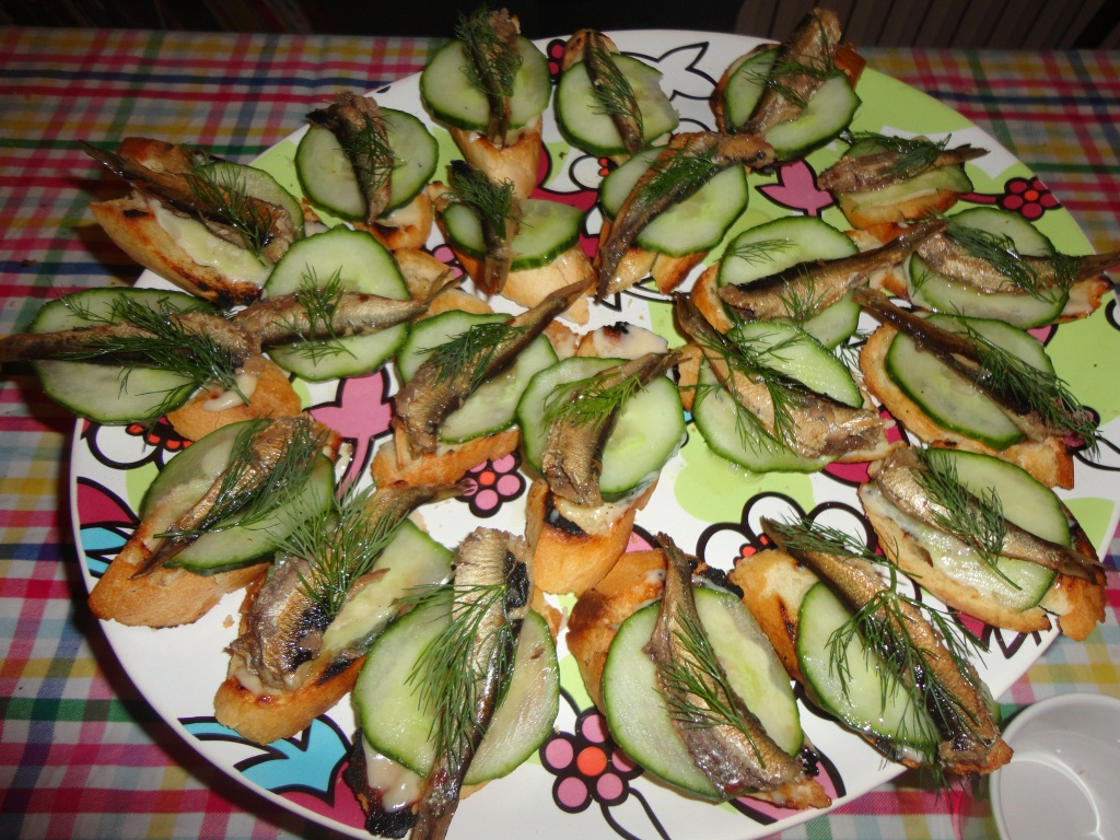 zakouskis aux sprats sont présents souvent sur la table russe. Ils sont faciles à faire.